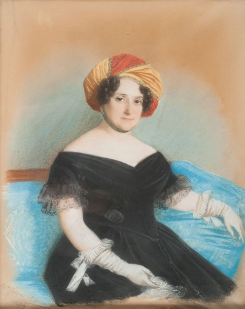 Portrait présumé de Madame Frédéric Louis Tattet (1768-1861).